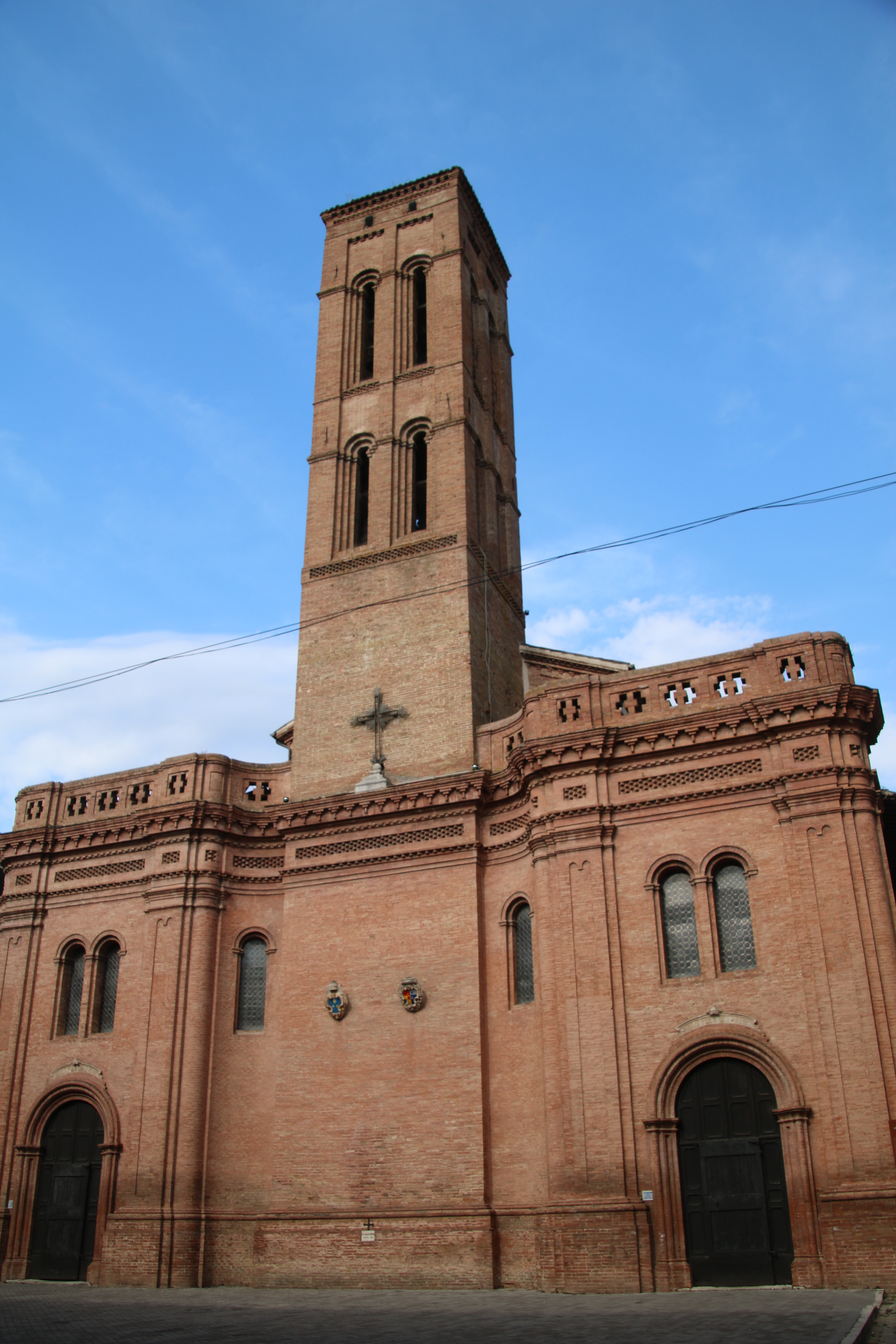 Cattedrale di Santa Maria Assunta, Matelica